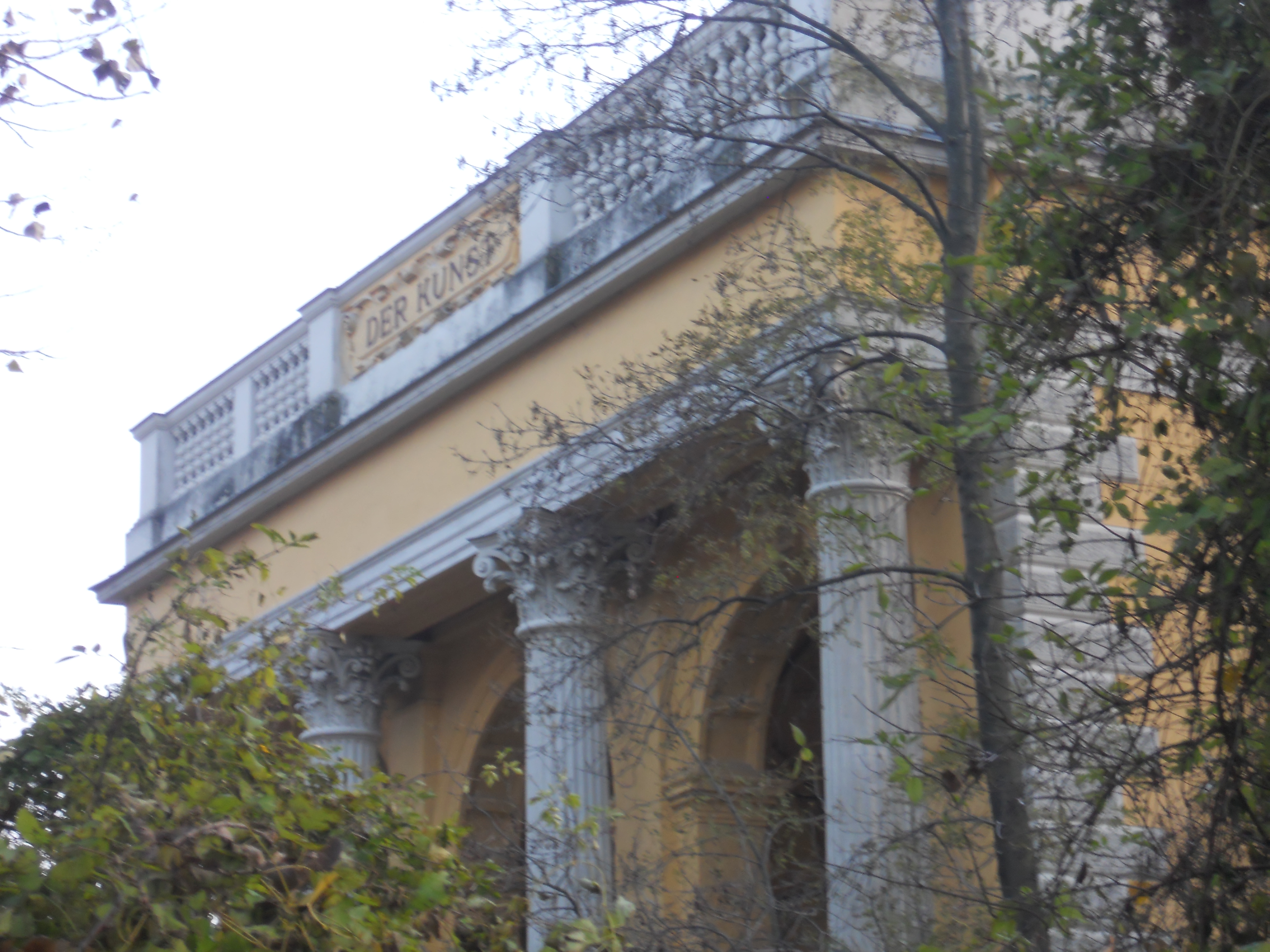 Bildhaueratelier des Bundes (südlicher Pavillon), Krieau